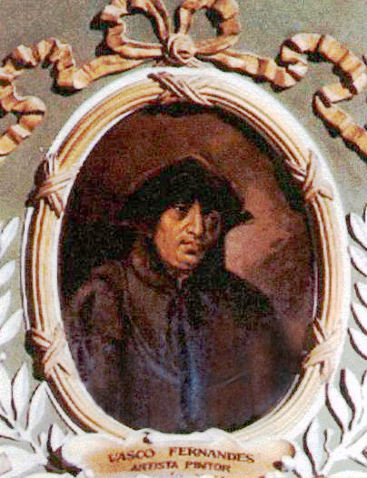 portrait du peintre portugais Vasco Fernandes, dit Grão Vasco (le Grand Vasco)